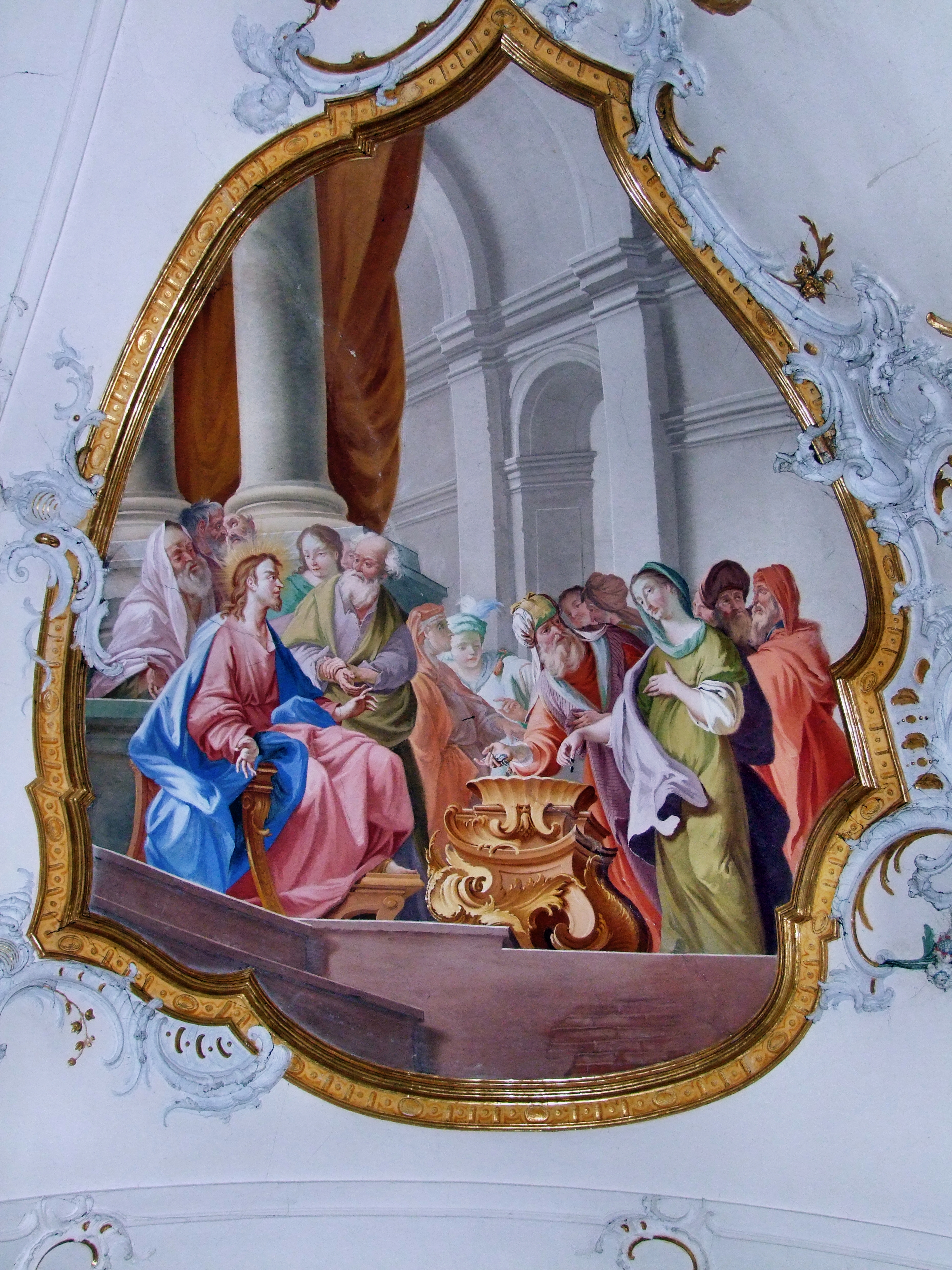 Opfer der armen Witwe - Fresko (F2), Basilika Ottobeuren